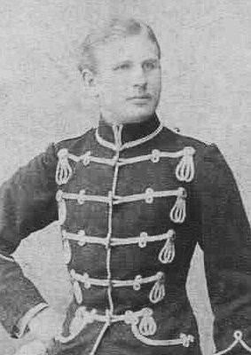 Ludwig Meyländer genannt Rogalla von Bieberstein (1873-1940), in 1908